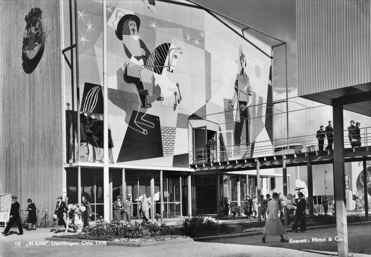 Vi kan-utstillingen på Frognerstranda ved Frognerkilen i 1938